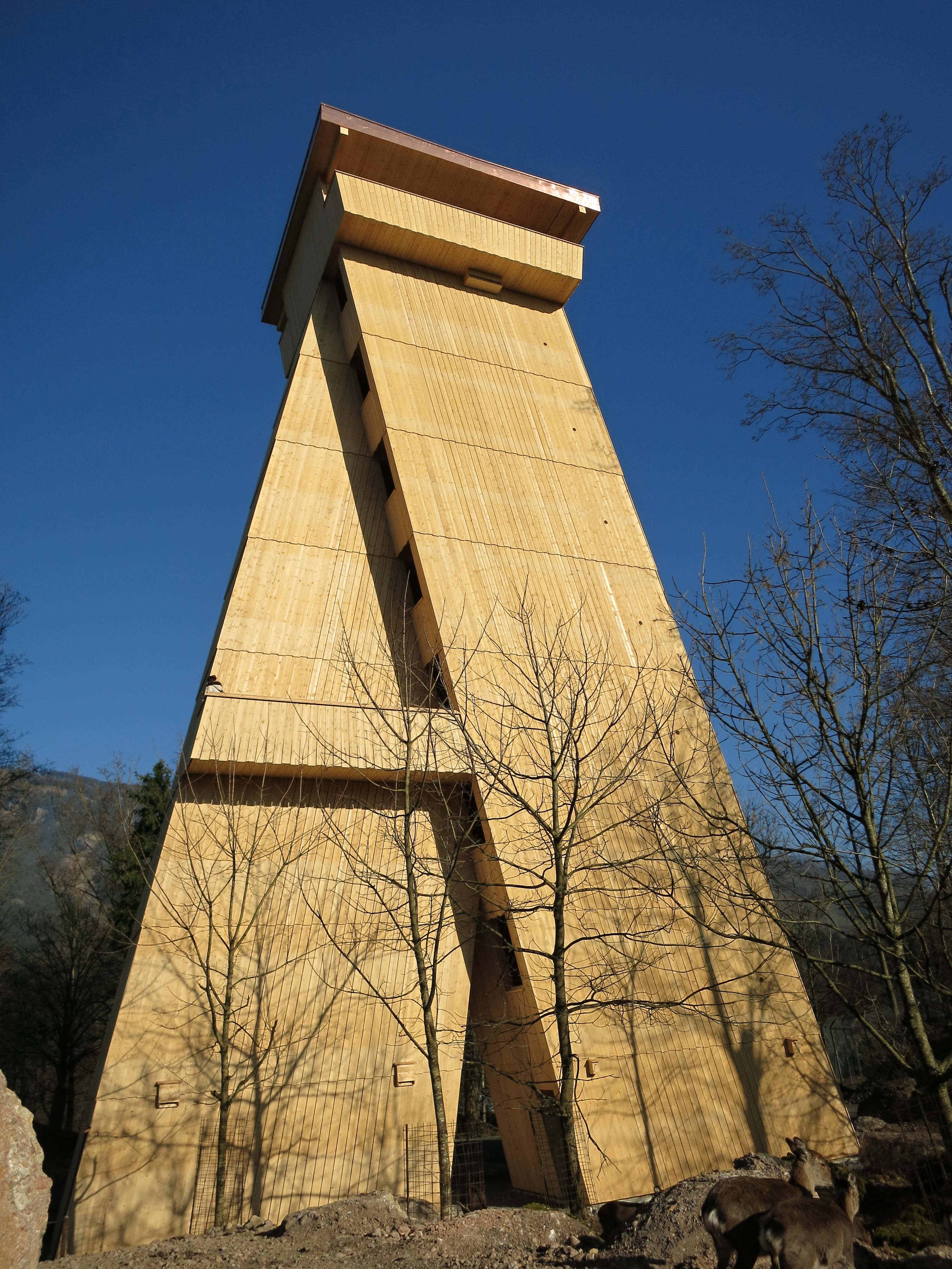 Tierparkturm Goldau